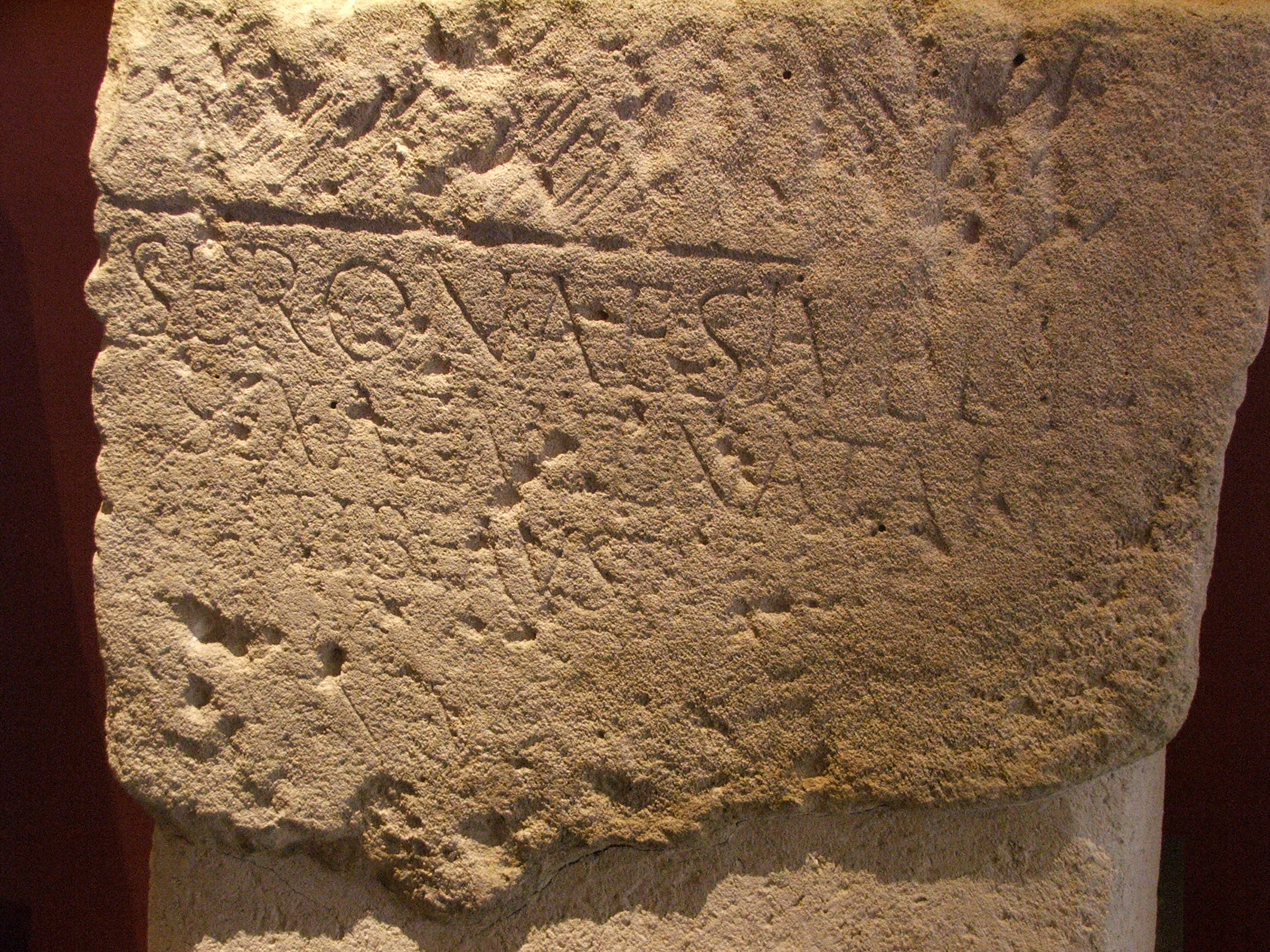 Dédicace aux dieux Apollon et Serona dans un ancien temple du Mans, autrefois Vindunum.